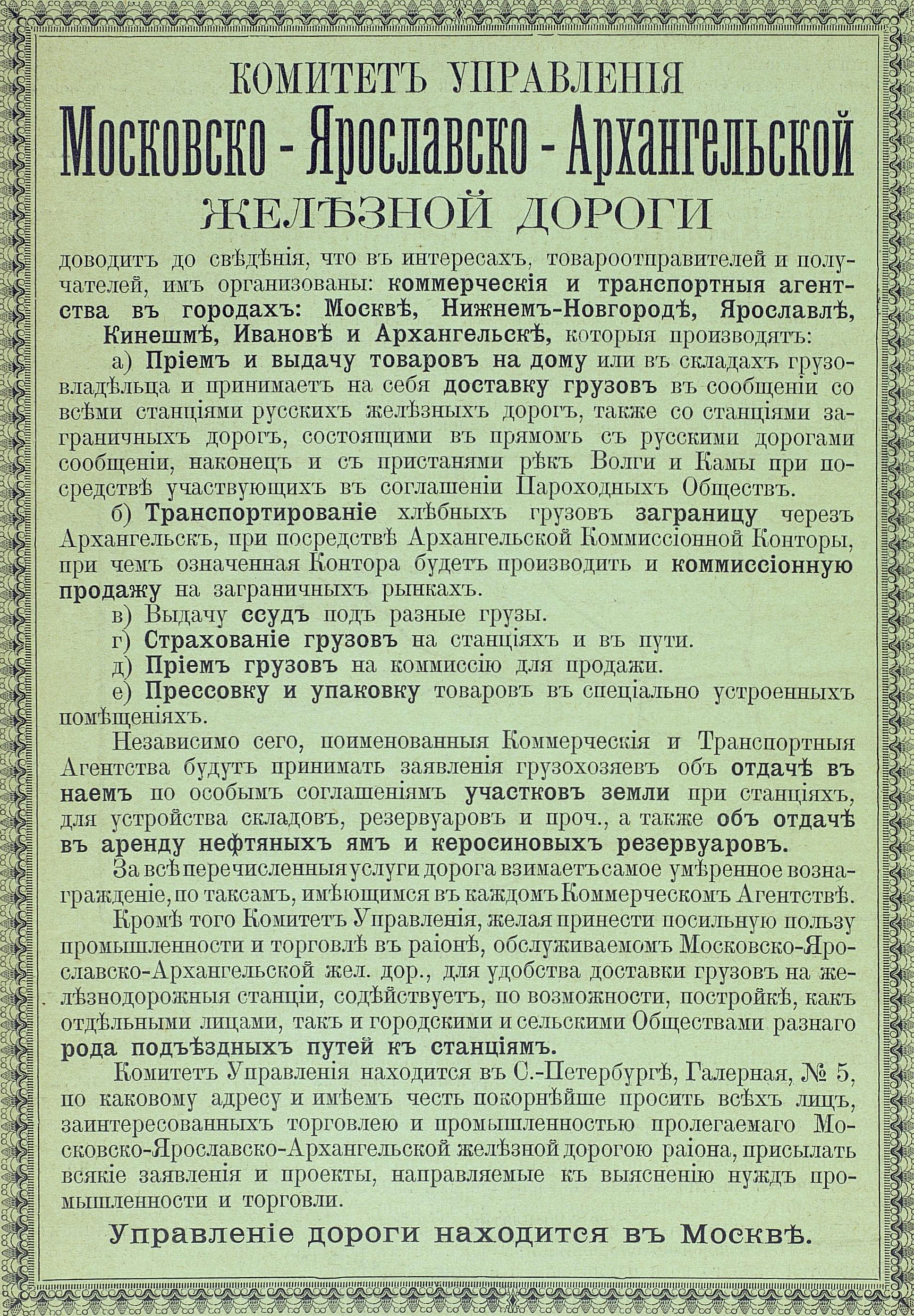 Реклама услуг Московско-Ярославско-Архангельской жел. дор., 1901 год.